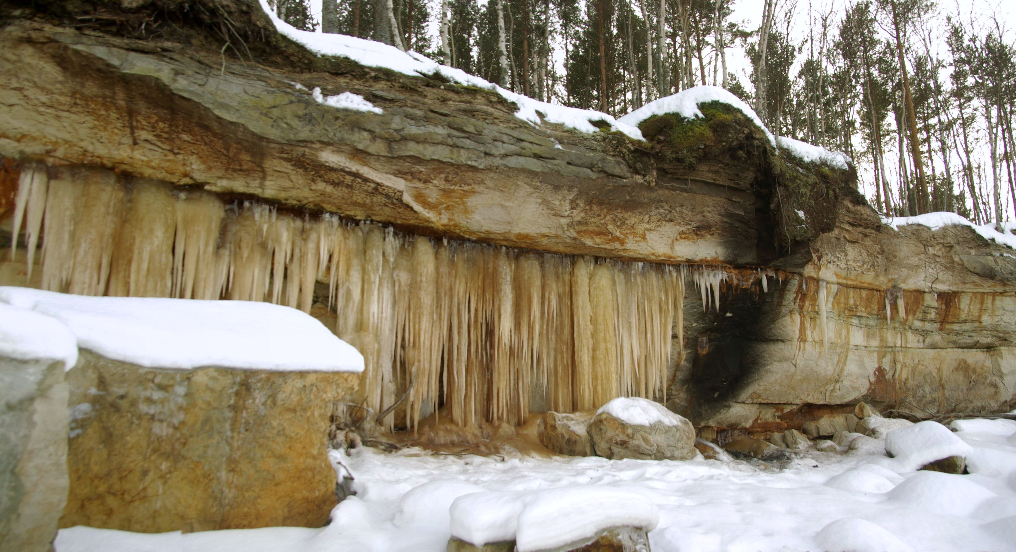 Suurupi poolsaare loodepoolsel küljel